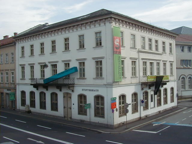 Das Stifterhaus in der oberösterreichischen Landeshauptstadt Linz.